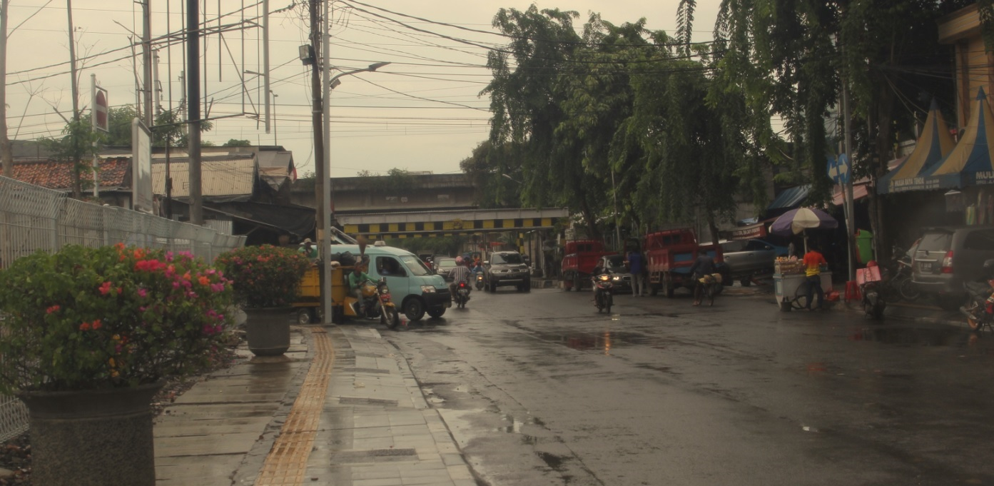 Letak bekas Gerbang Amsterdam yang sekarang berada di antara Jalan Cengkeh dan Jalan Tongkol.